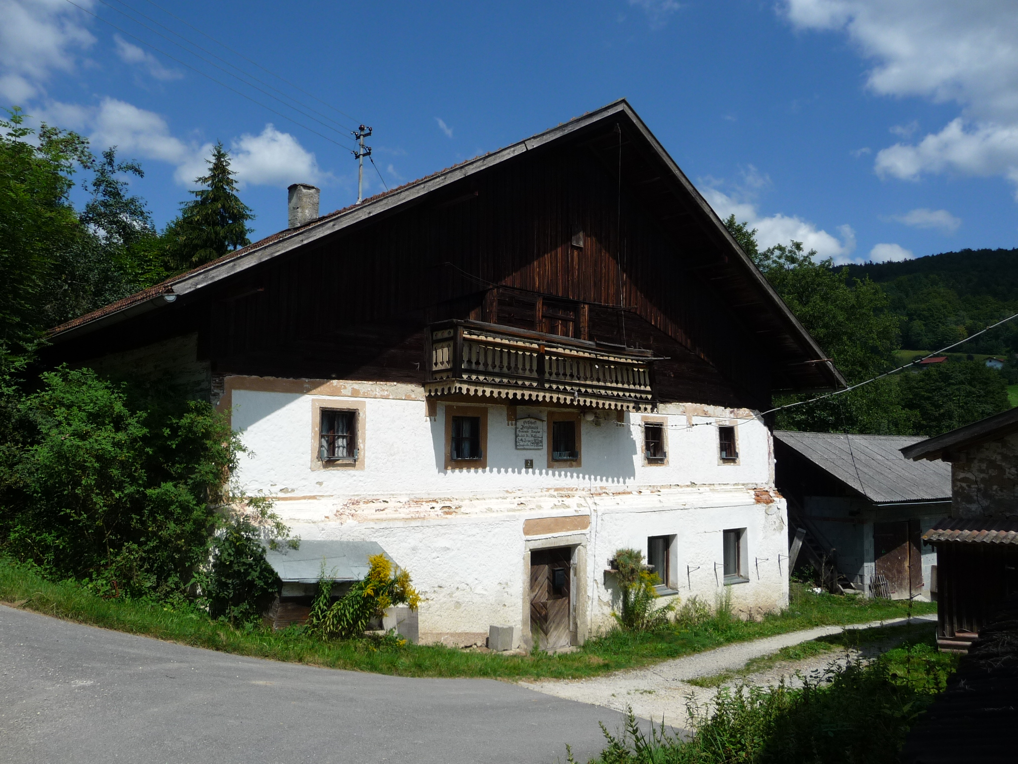 Denkmale in Aholming